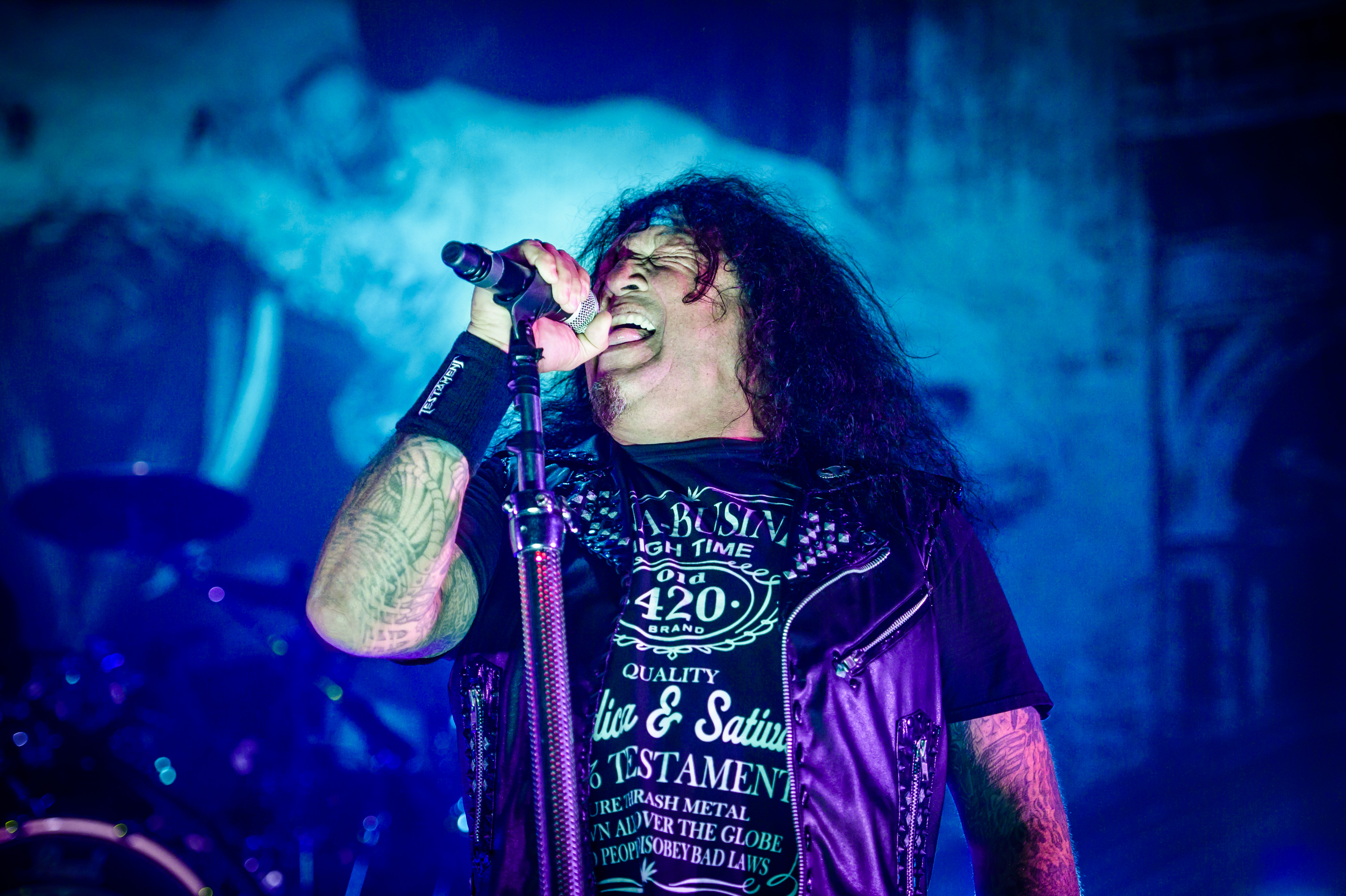 'Ruhrpott Metal Meeting 2017; Turbinenhalle Oberhausen': 'Testament'